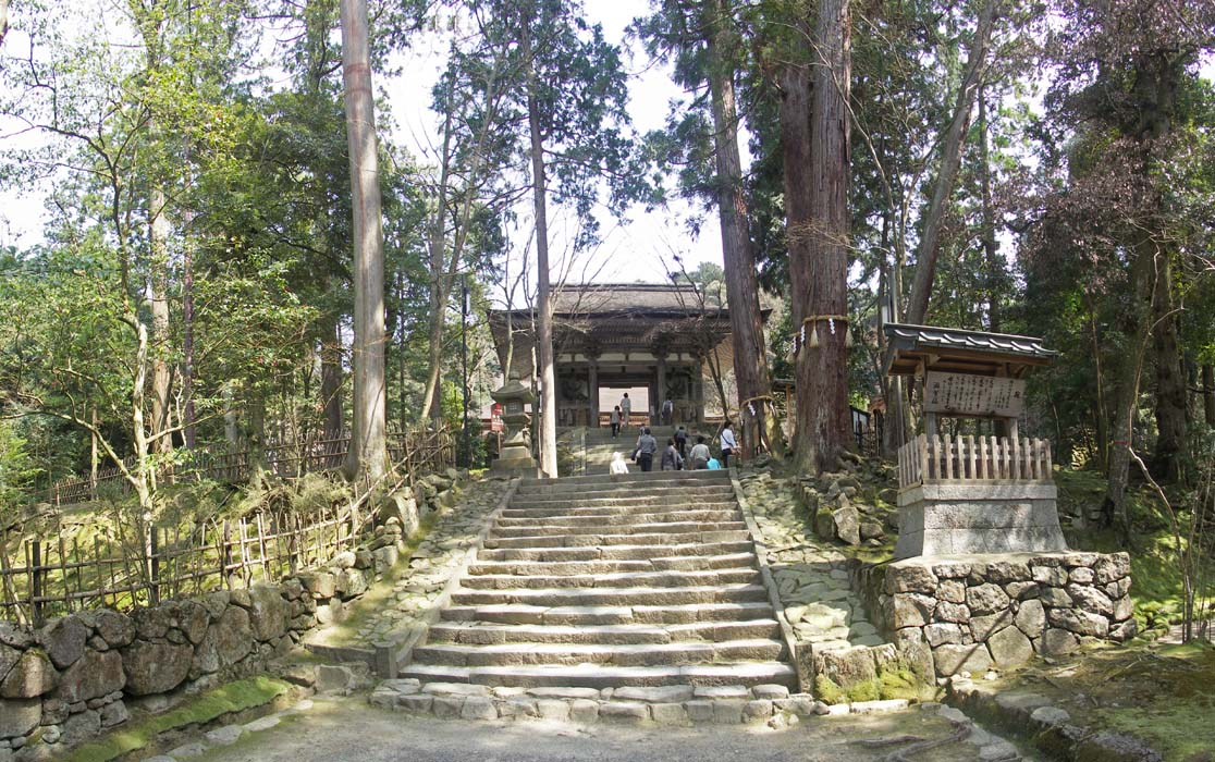 Saimyouji temple , 西明寺 二天門